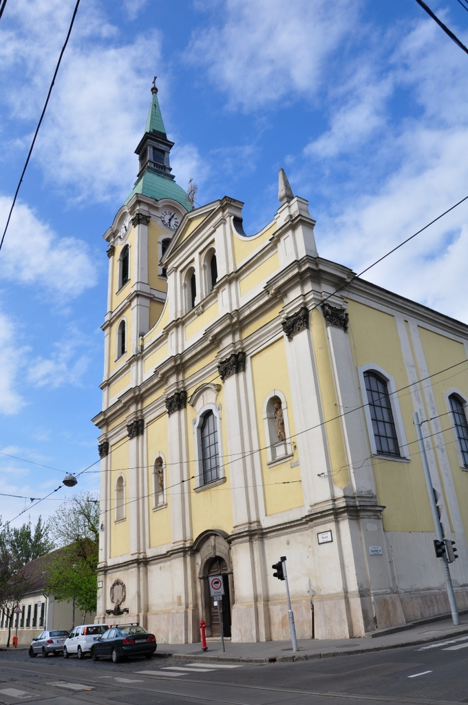 Roman Catholic Church in Újlak, Budapest This is a photo of a monument in Hungary, Identifier: 245